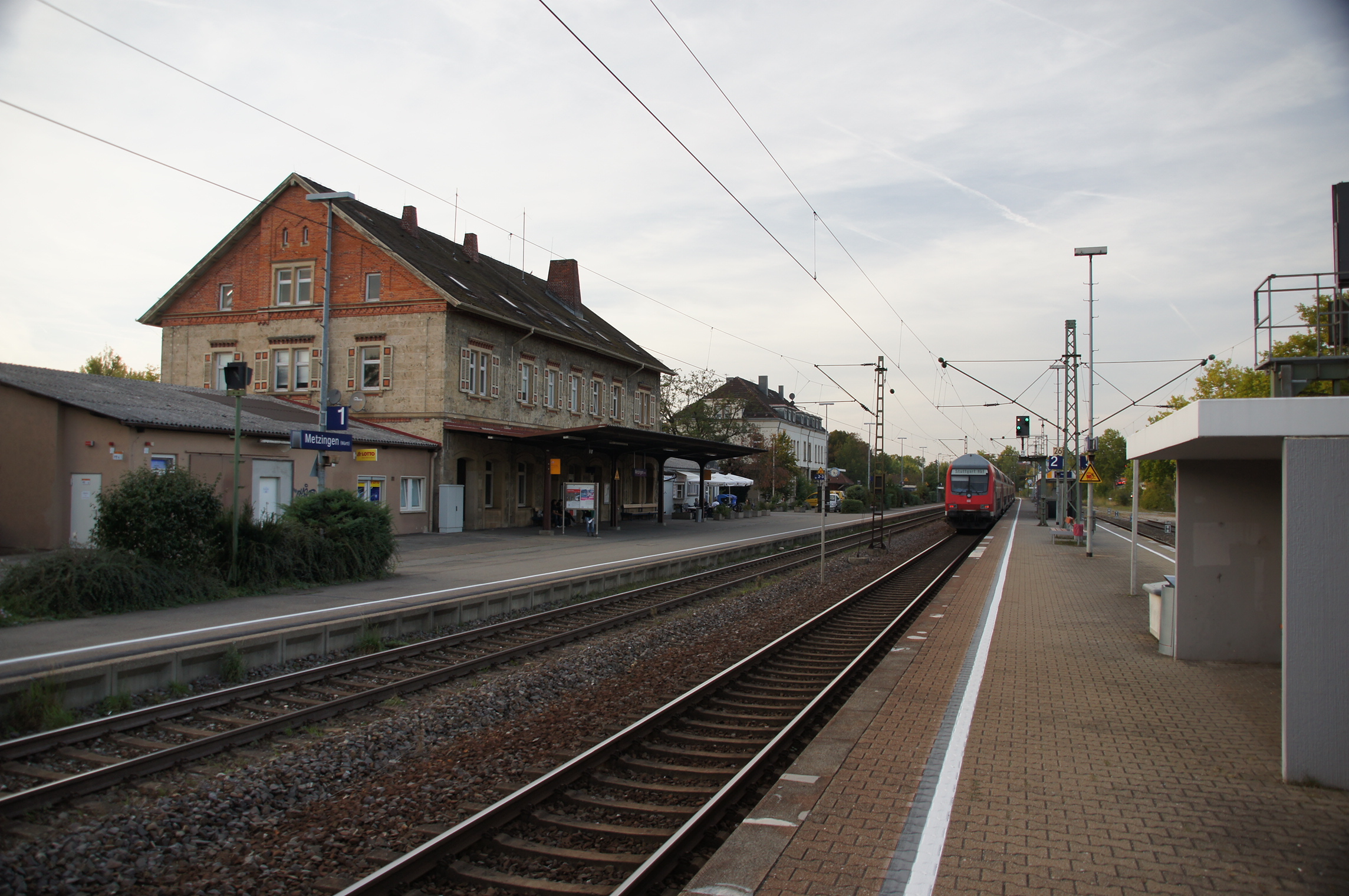 Bahnhof Metzingen.